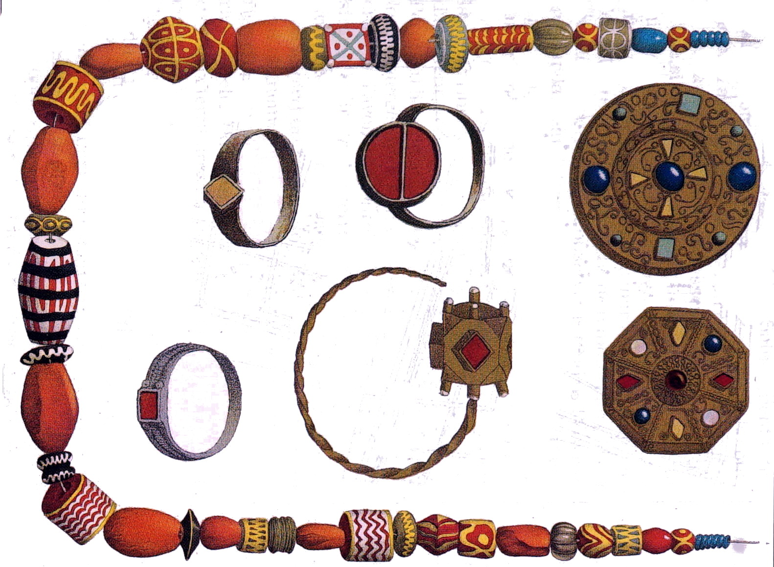 objet de fouilles archéologiques.